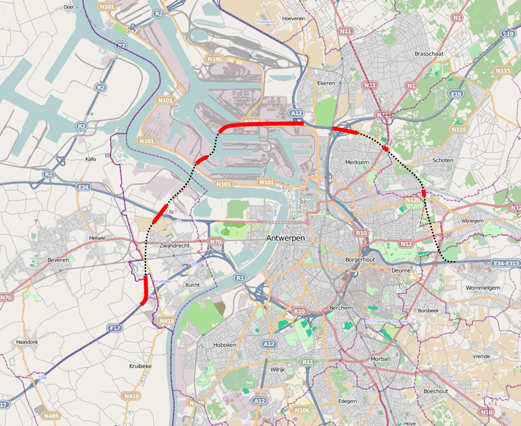 Voorstel oplossingsmodel voor de mobiliteitsproblematiek in Antwerpen door Forum 2020 in februari 2009 in antwoord op het verwerpen van een tunnel-brugtracé in een volksreferendum door de Antwerpse bevolking in oktober 2009.